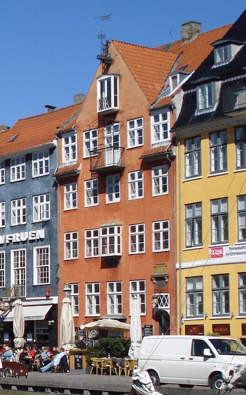 Nyhavn 41 in Copenhagen, Denmark